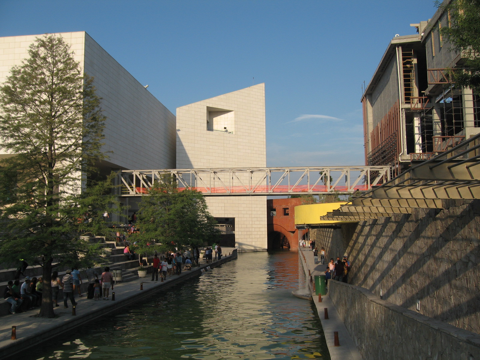 Paseo Santa Lucía